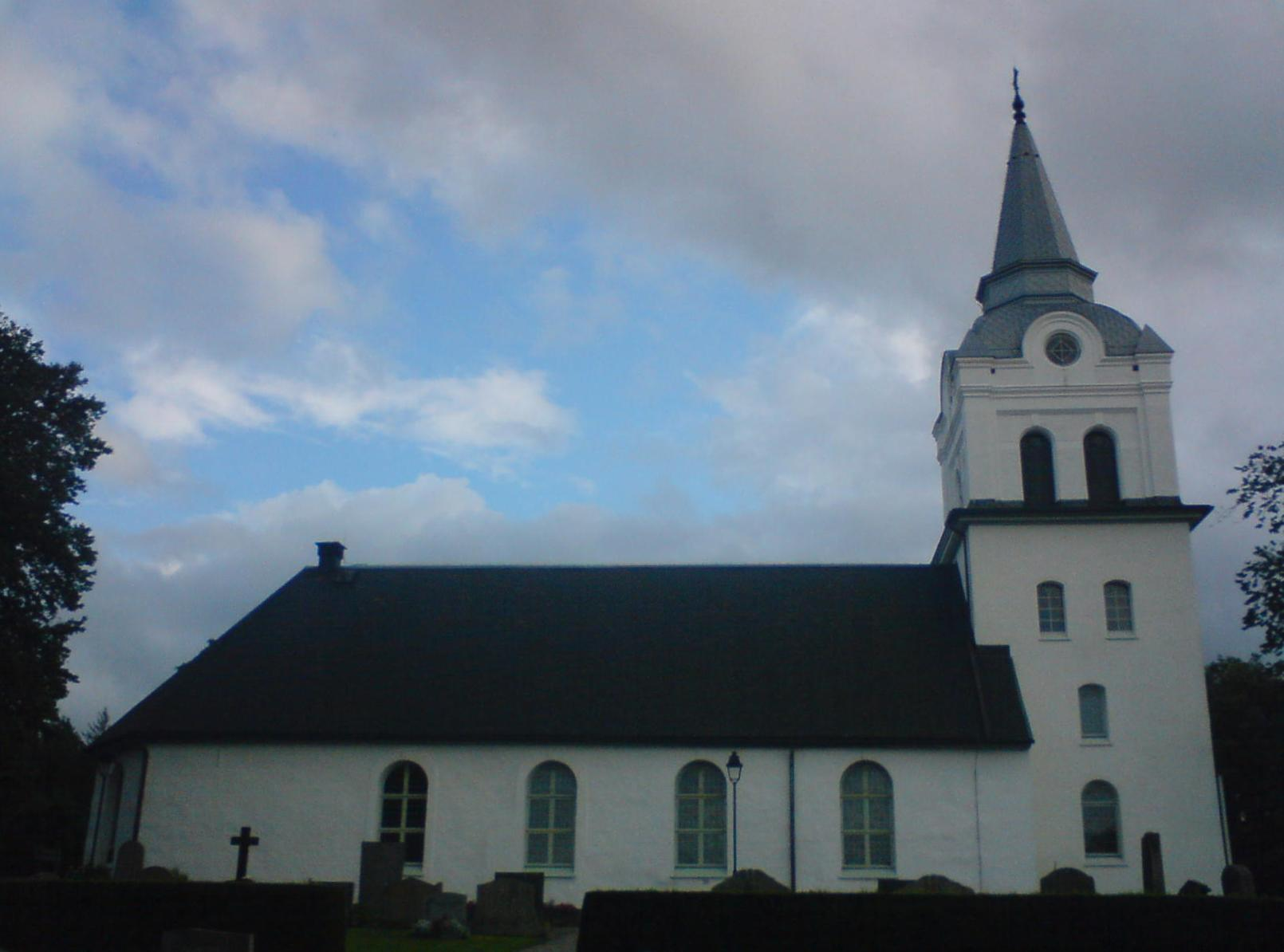 Västerlanda kyrka i södra Inlands Torpe härad i södra Lilla Edets kommun (i kommunens västra Bohuslänsdel).